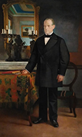 Retrato de Mariano Suárez-Pola